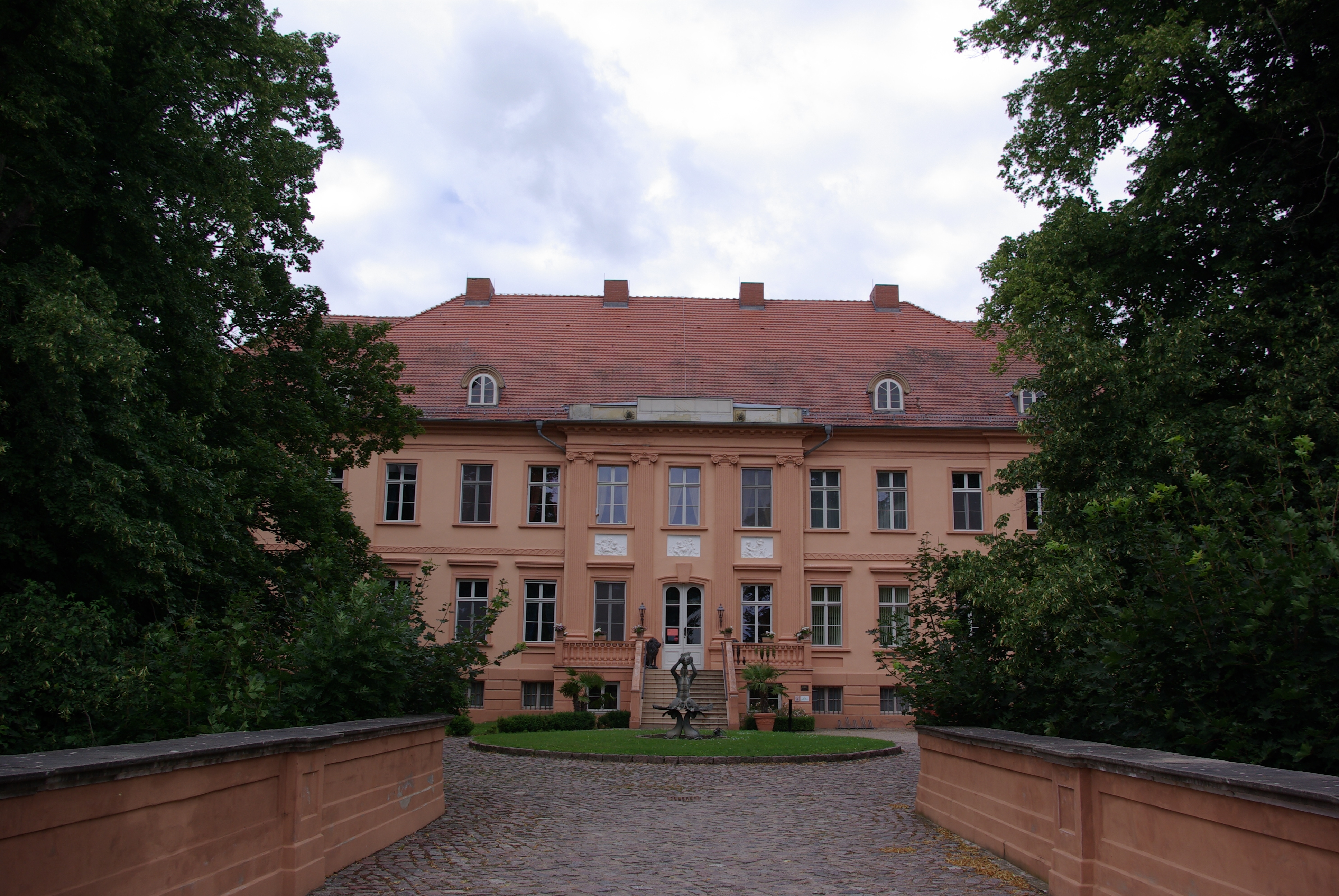 Rühstädt in Brandenburg. Das Schloss steht unter Denkmalschutz. In dem Schloss befindet sich heute ein Hotel.